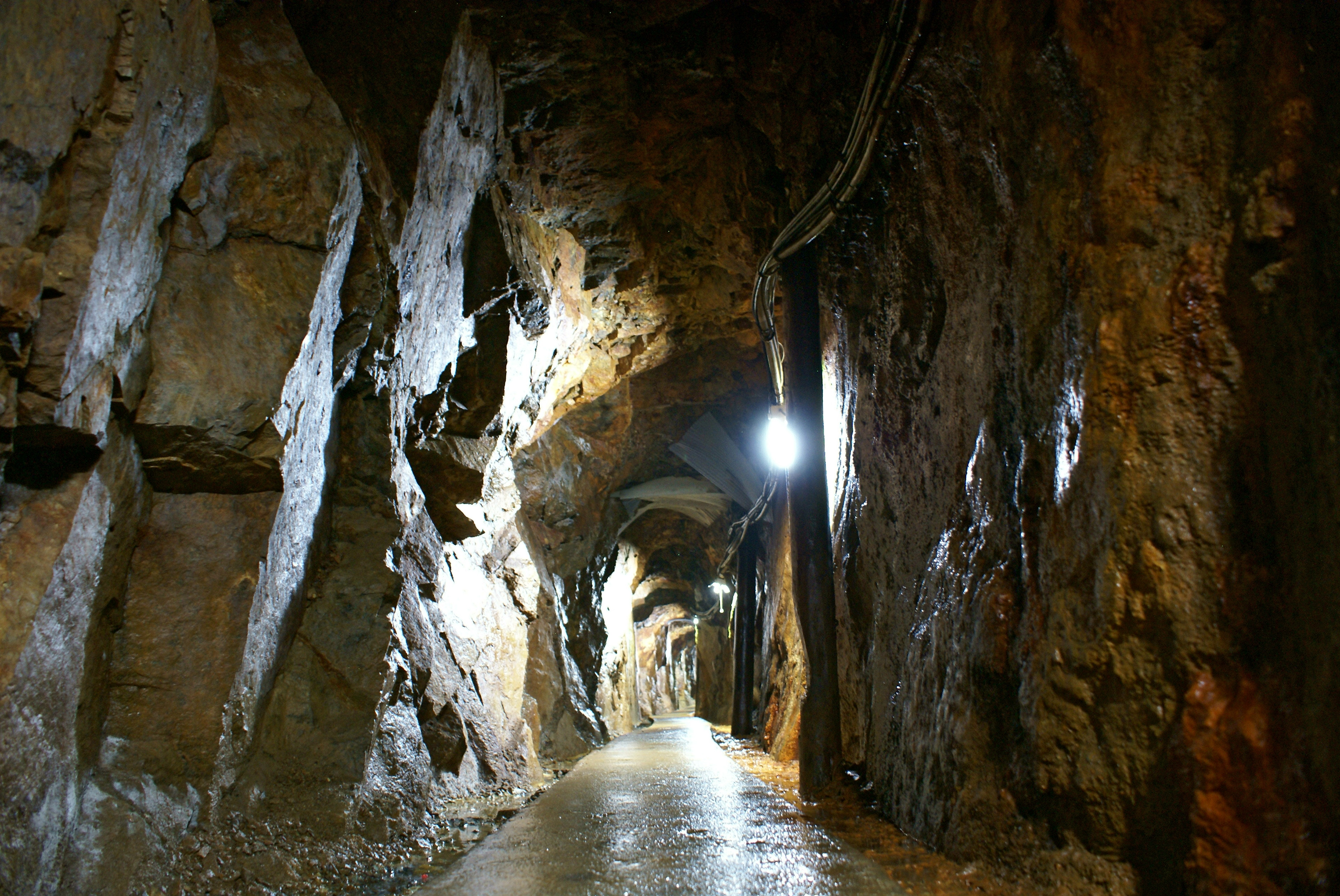 Sasaune gallery of Yoshioka copper mine, Takahashi, Okayama, Japan